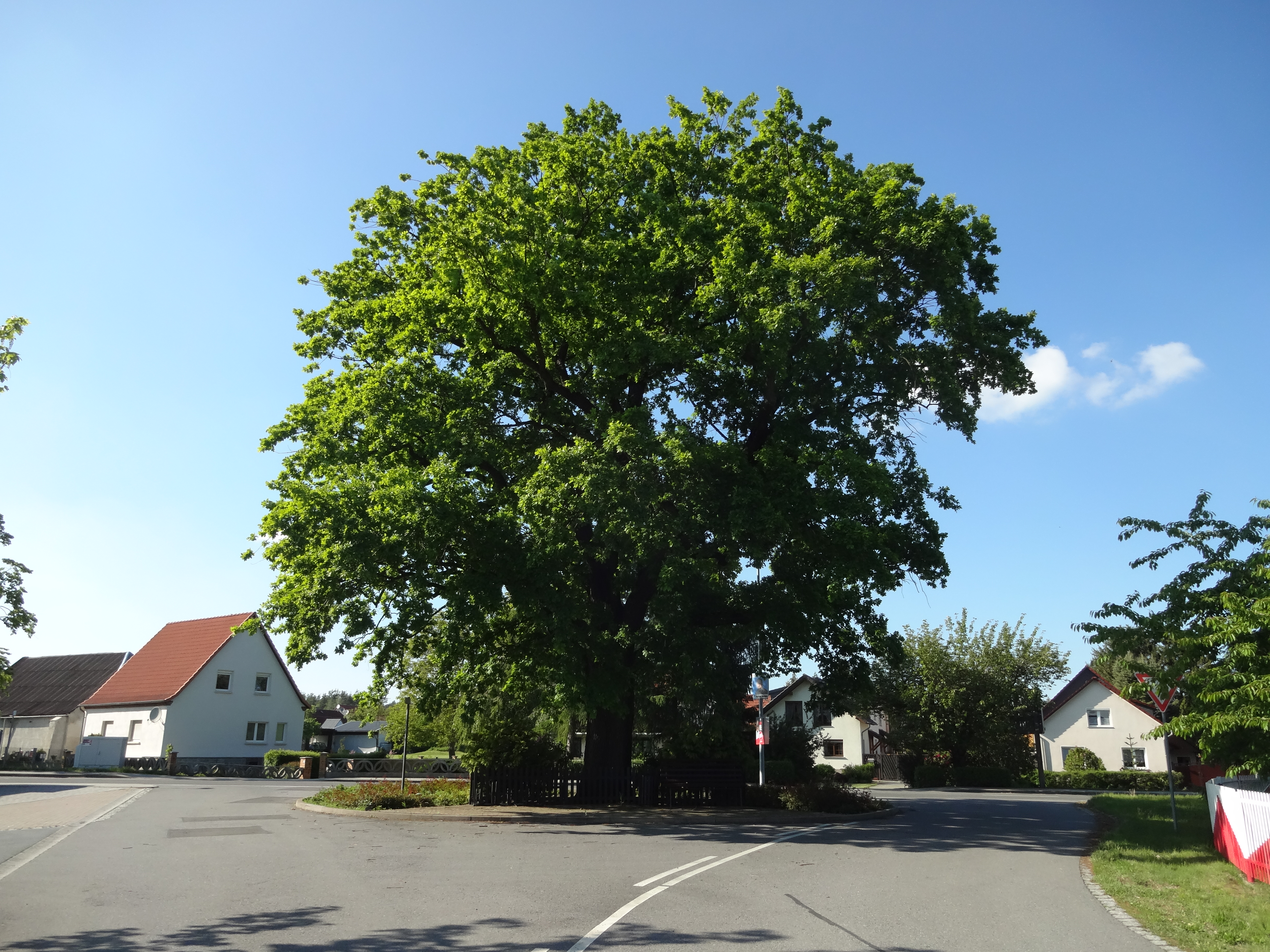 als Naturdenkmal geschützte Stieleiche am Kriegerdenkmal in Grünewald an der Hauptstraße